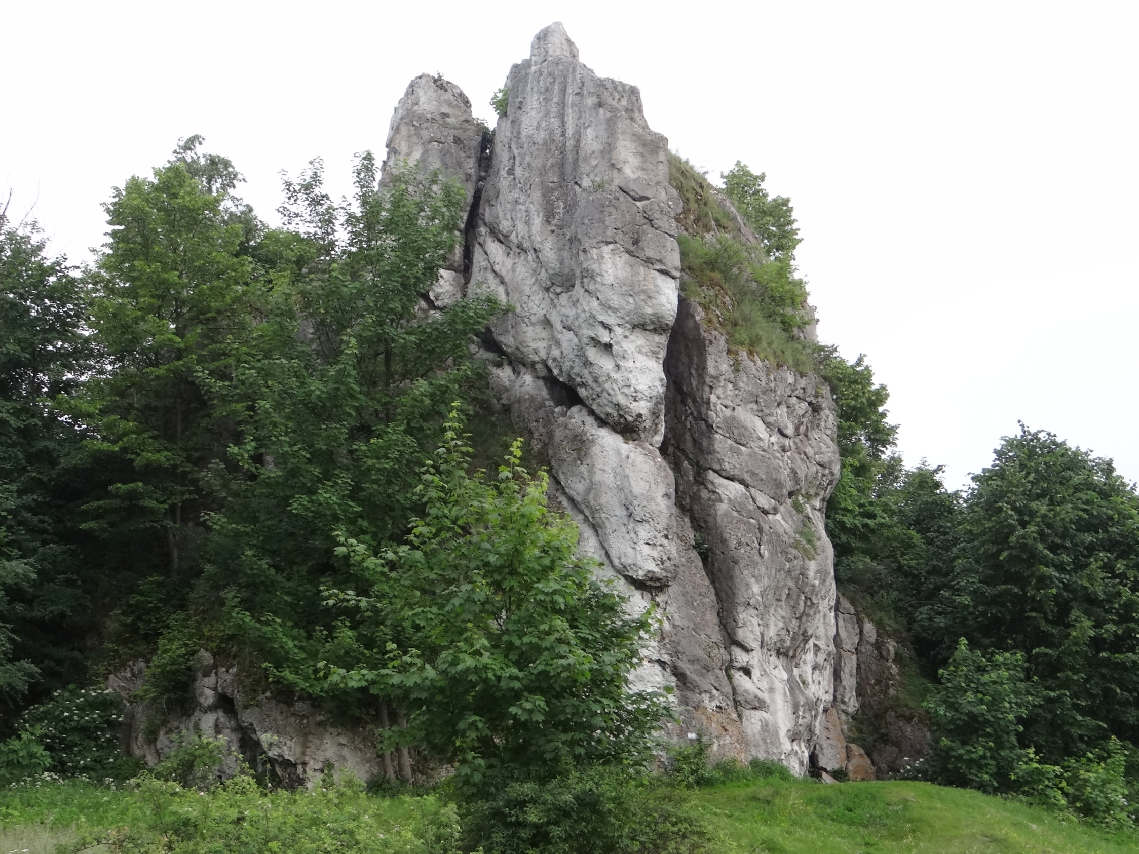 Skały Grupy Knura w Łutowcu